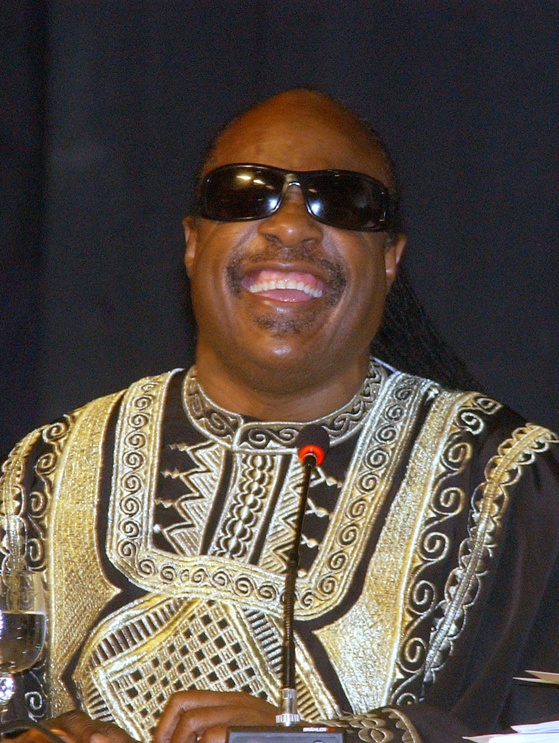 Salvador (BA) - O Cantor Stevie Wonder fala na abertura da 2ª Conferência de Intelectuais da África e da Diáspora em Salvador.